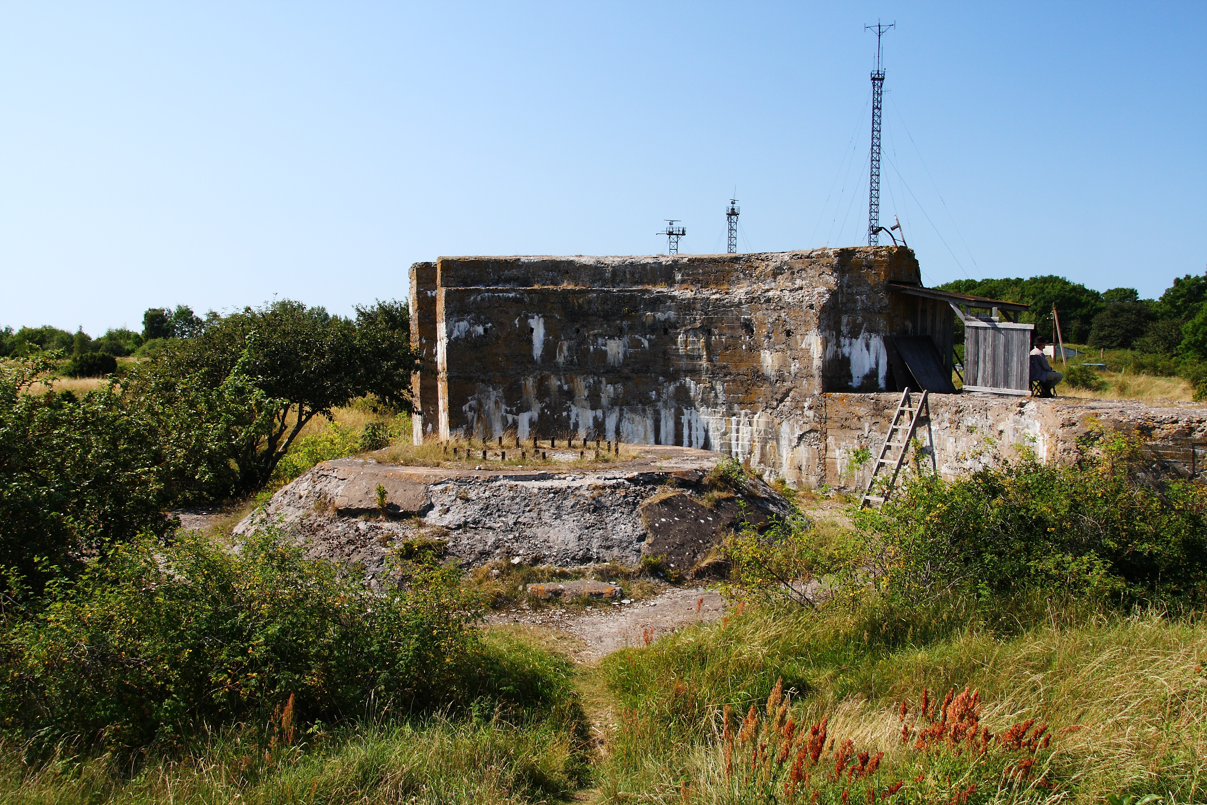 Остатки укреплений батареи №43 на мысе Церель